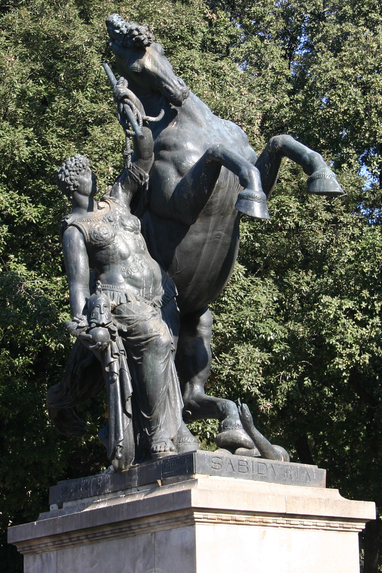 Saviesa. Plaza Catalunya. Barcelona (Spain)